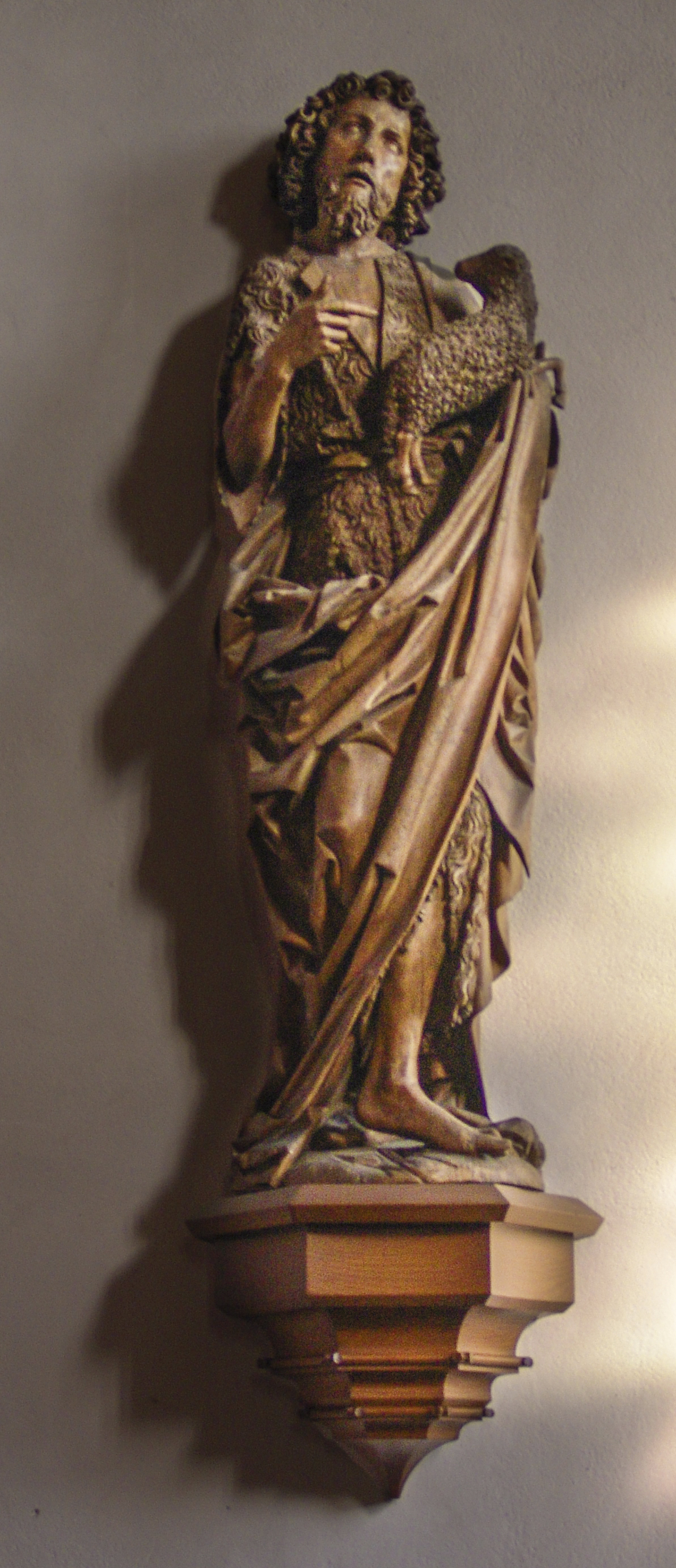 Haßfurt, Kath. Stadtpfarrkirche St. Kilian, Johannes der Täufer von Tilman Riemenschneider